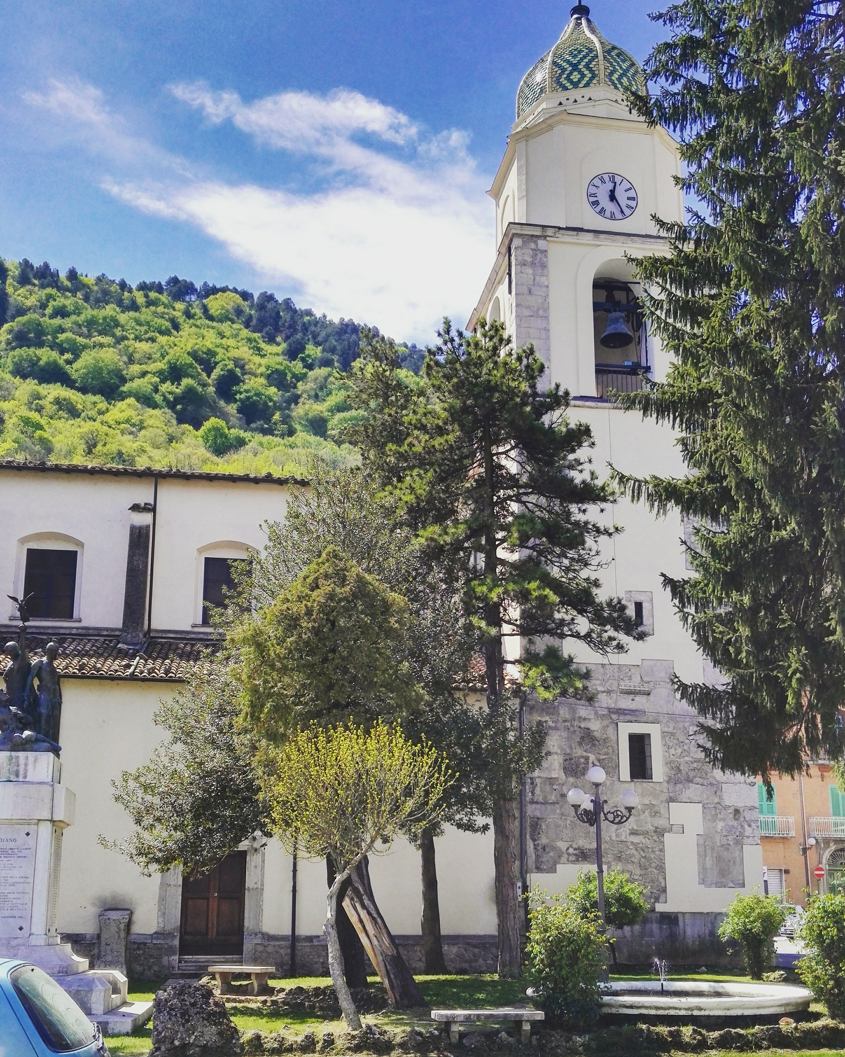 Vista laterale della cattedrale di Bojano con visibile la torre campanaria ed un giardino